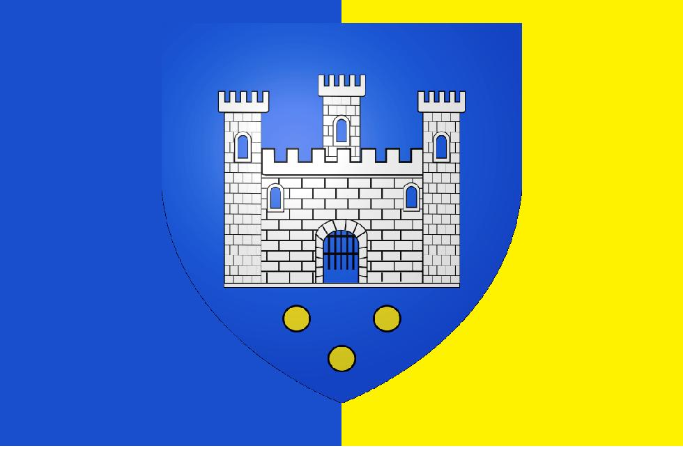 Drapeau armorié d'Hyères